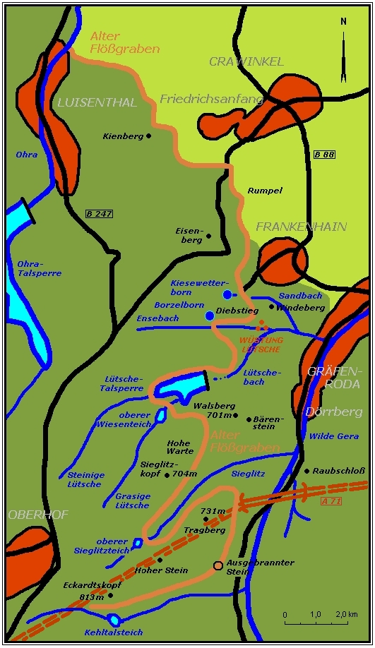 Lütsche und Umgebung Sonstiges: ...